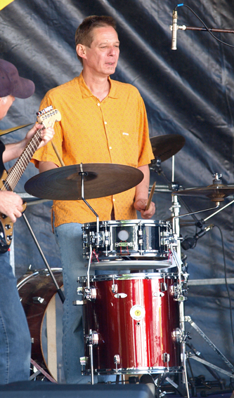 Cocktail drum modèle R2d2 de Zewi Neriss Drums